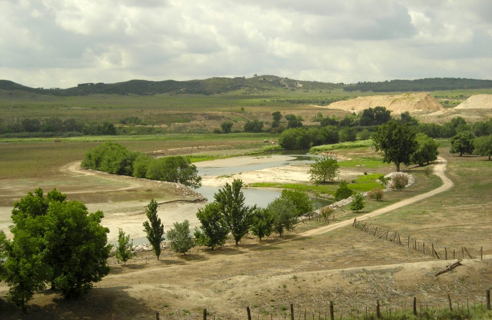 Parque Lineal del Manzanares a su paso por el Parque Regional del Sureste